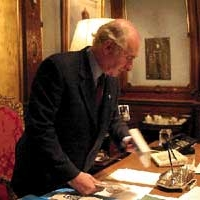 Luego de enviar la renuncia al Congreso, De La Rúa permaneció casi una hora retirando sus efectos del despacho presidencial.